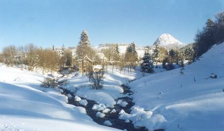 Confluent de la Loire et de l'Aigue Nègre sous la neige au pied du mont Gerbier de Jonc (France/Ardèche).